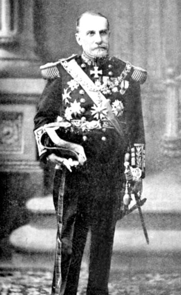 Jorge Montt Álvarez (1845-1922)